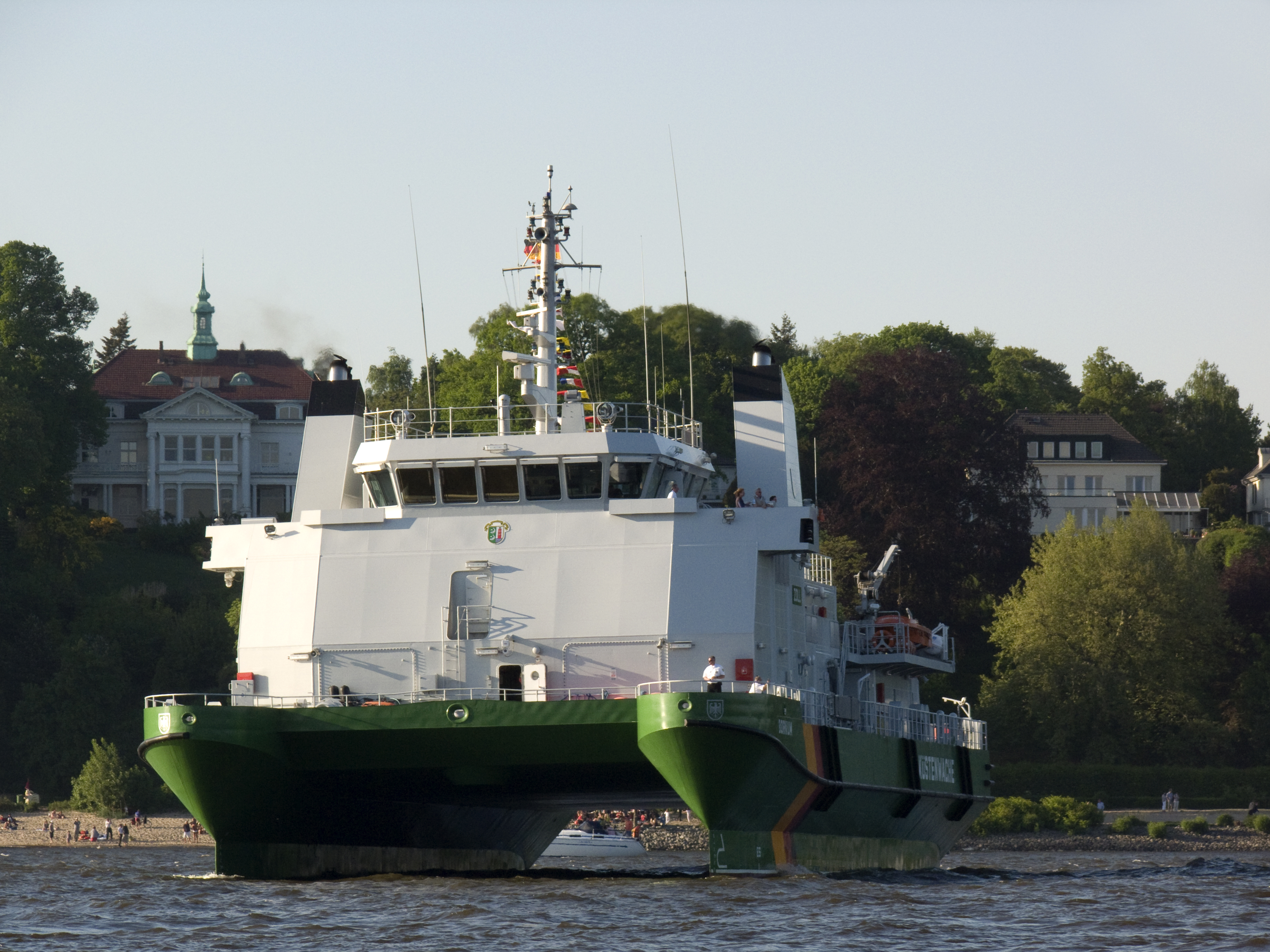 Zollboot "Borkum"